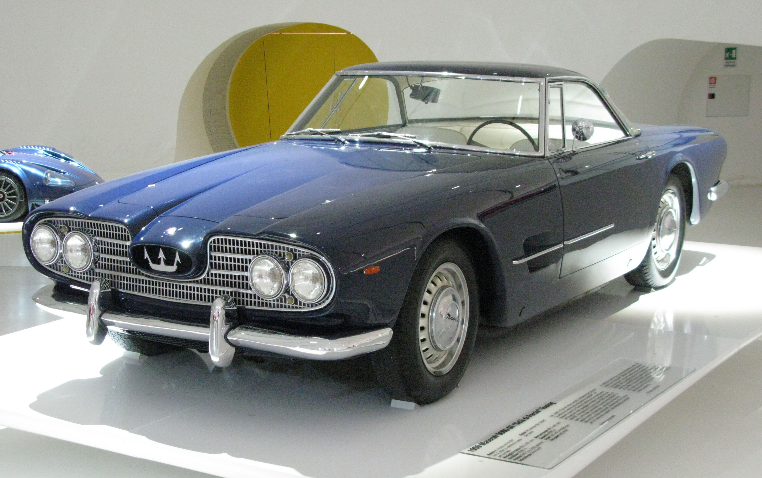 Maserati 5000 GT "Scia di Persia".